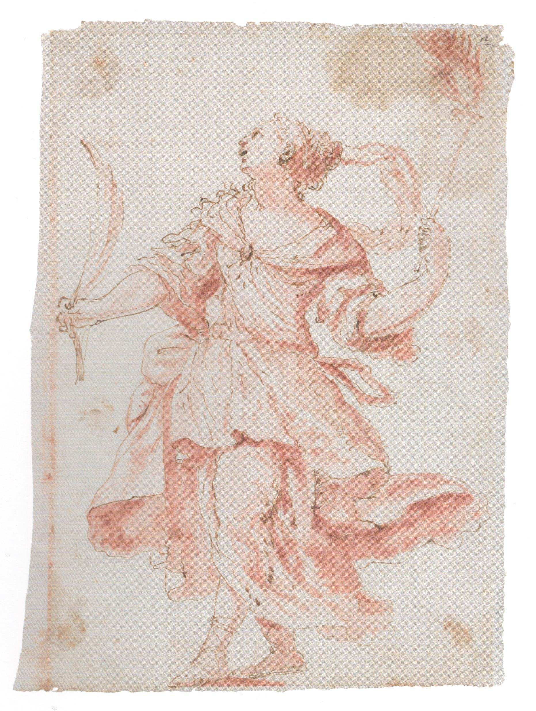 Crtež perom i smeđom tintom, laviran kistom i sangvinom, Kabinet grafike Hrvatske akademije znanosti i umjetnosti (HAZU)